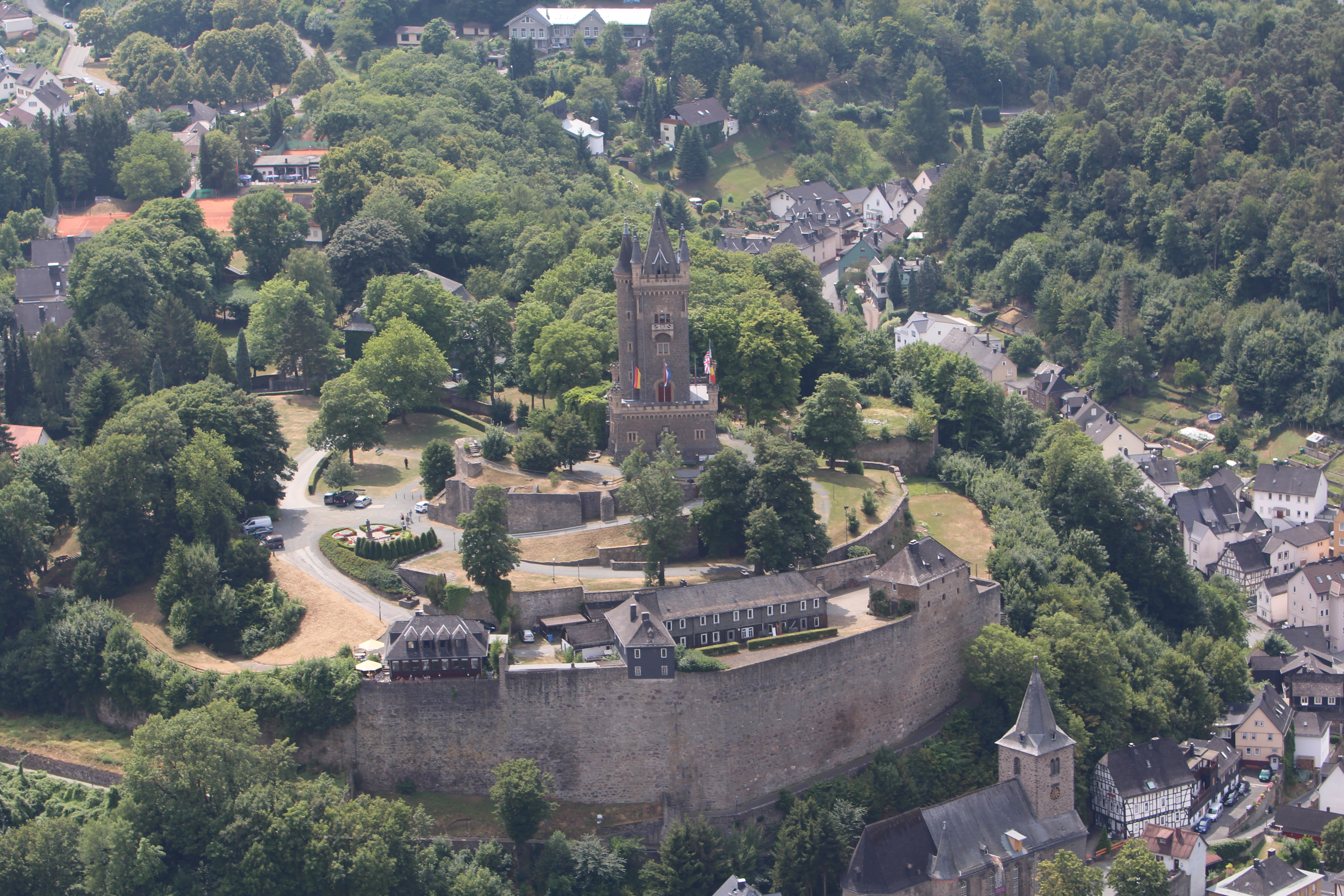 Der Wilhelmsturm in Dillenburg (Hessen)